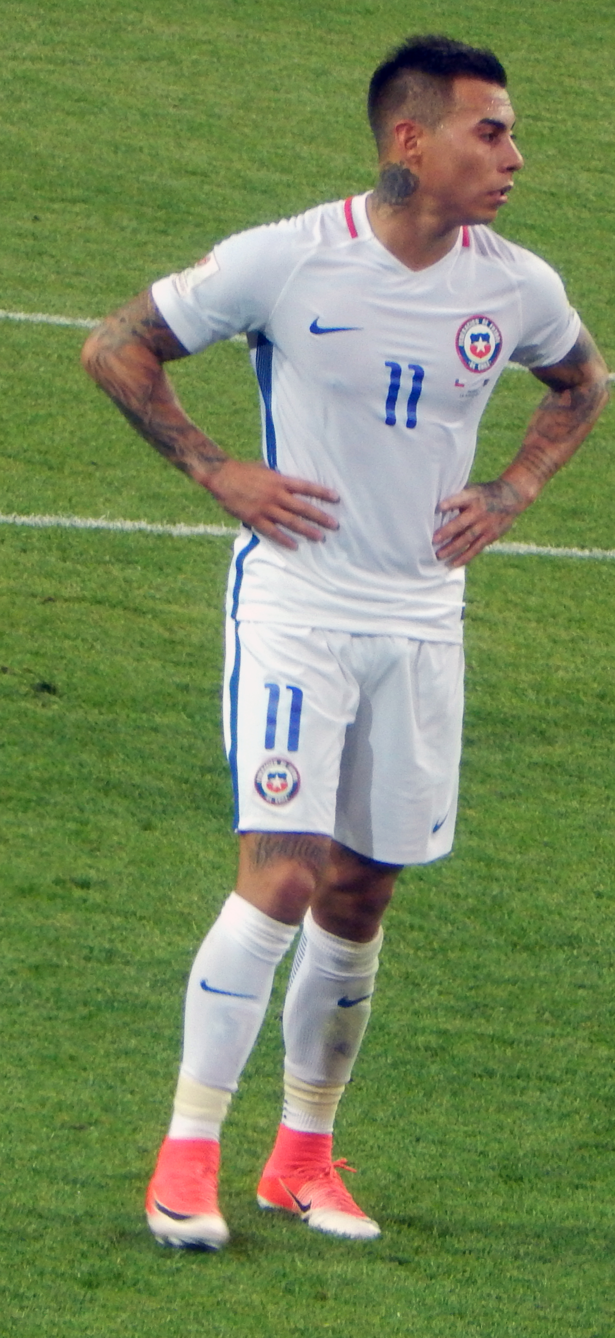 Эдуардо Варгас во время матча против сборной Камеруна